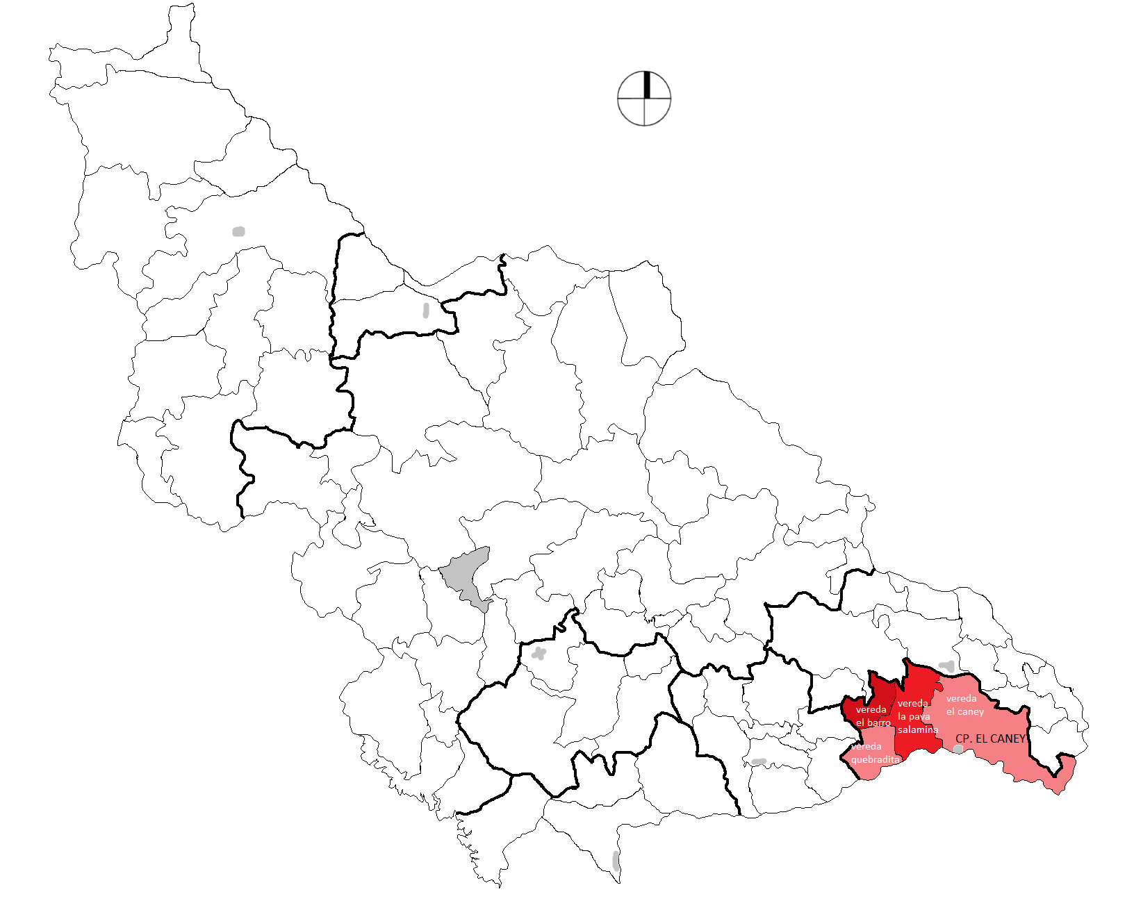 Veredas de El Caney, Santa Rosa de Osos